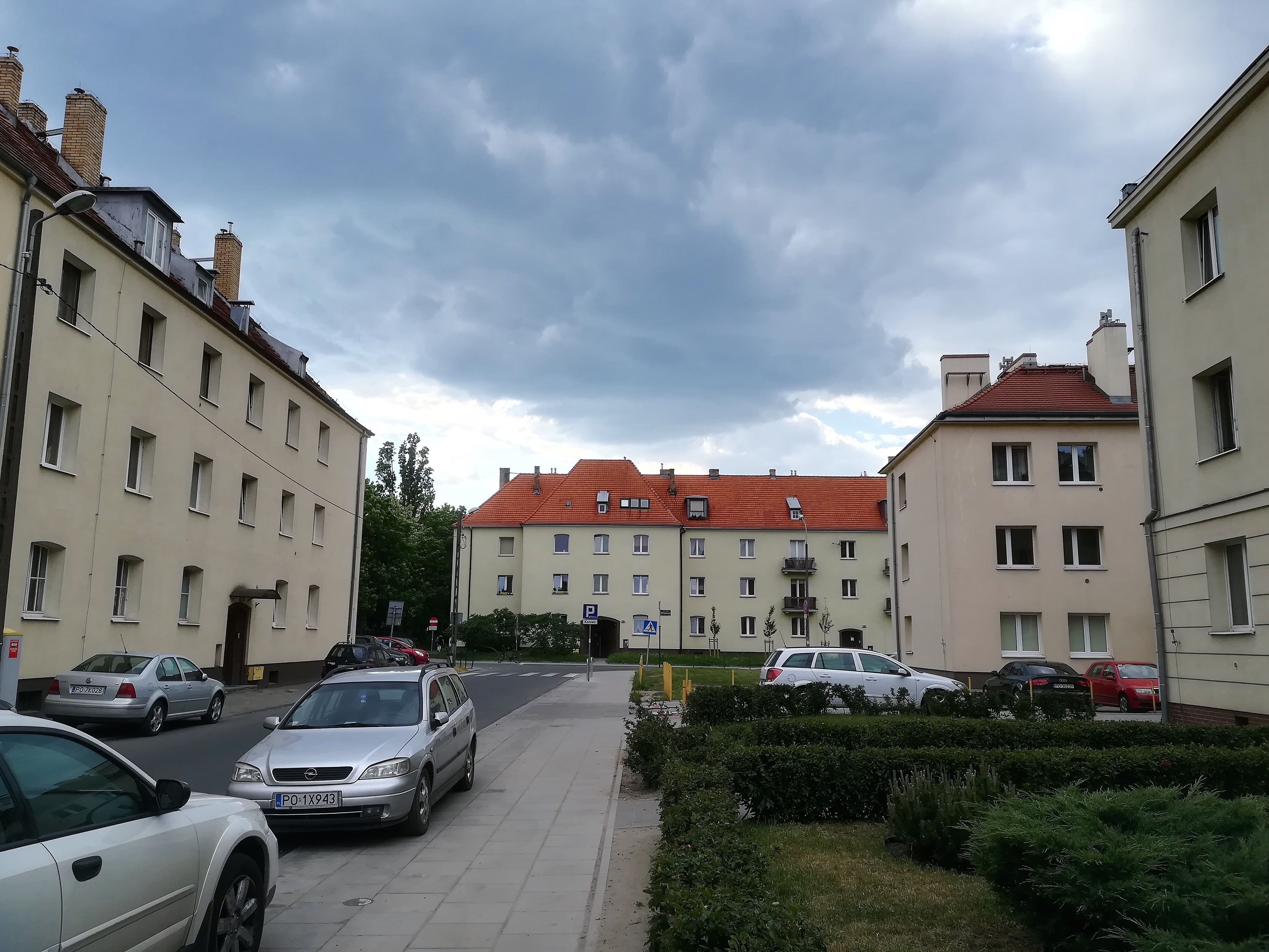 Tzw. Weststadt w Poznaniu - osiedle z okresu okupacji niemieckiej, ul. Jackowskiego.